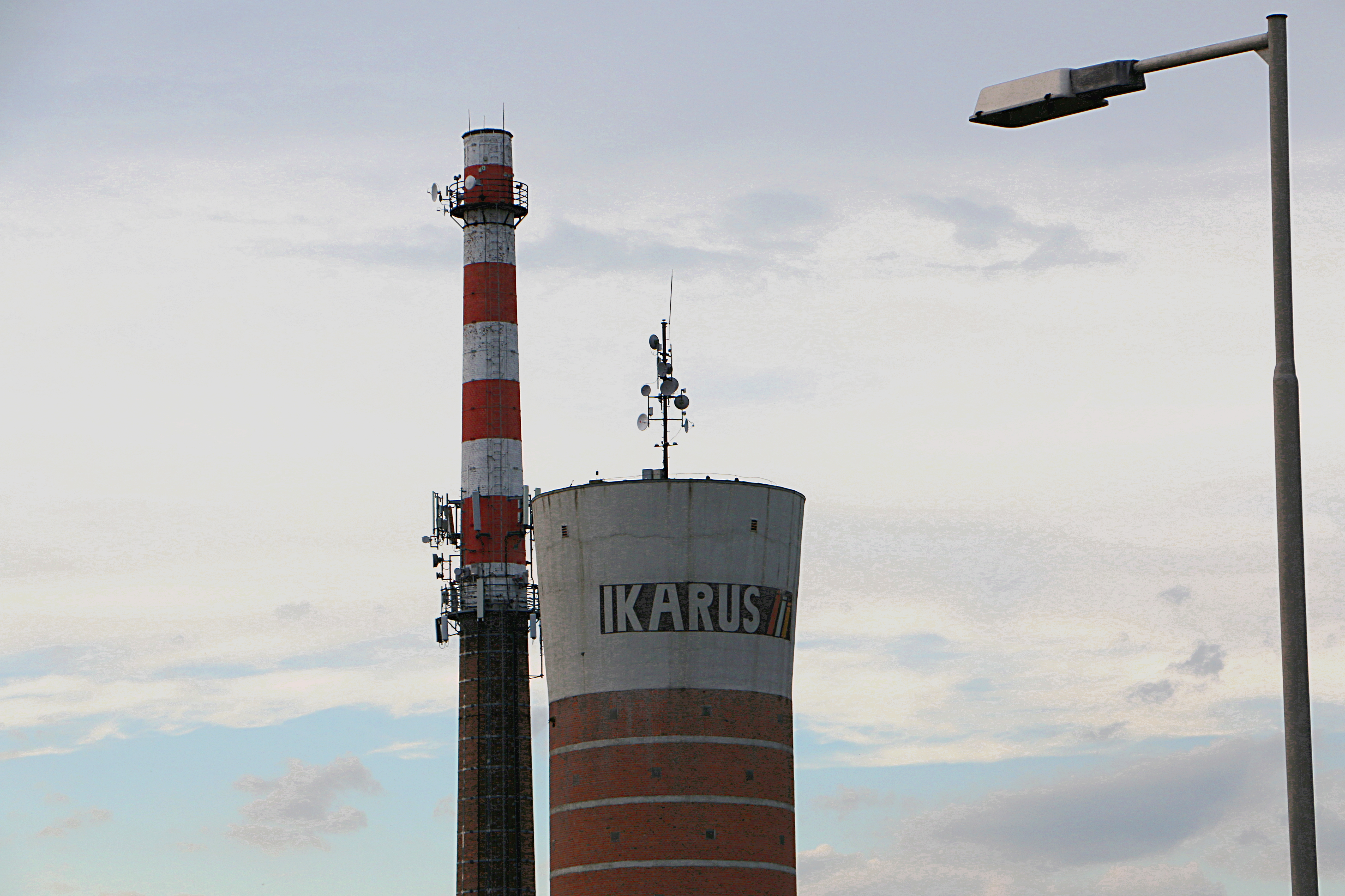 Az Ikarus gyár víztornya Mátyásföldön a Margit utcából